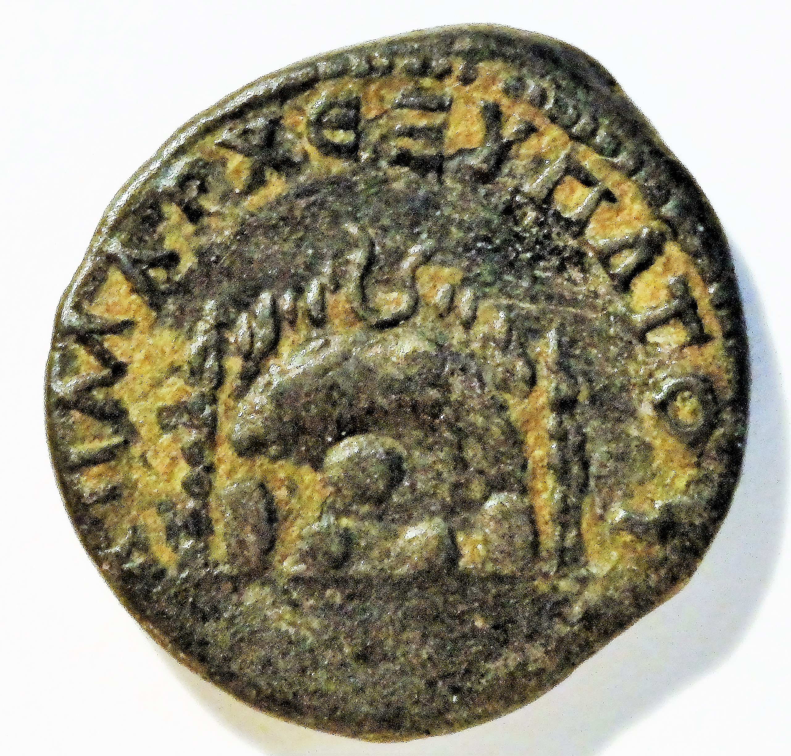 Berg Argaeus auf Didrachme z.Zt. Trajans (98-117 n.Chr.)